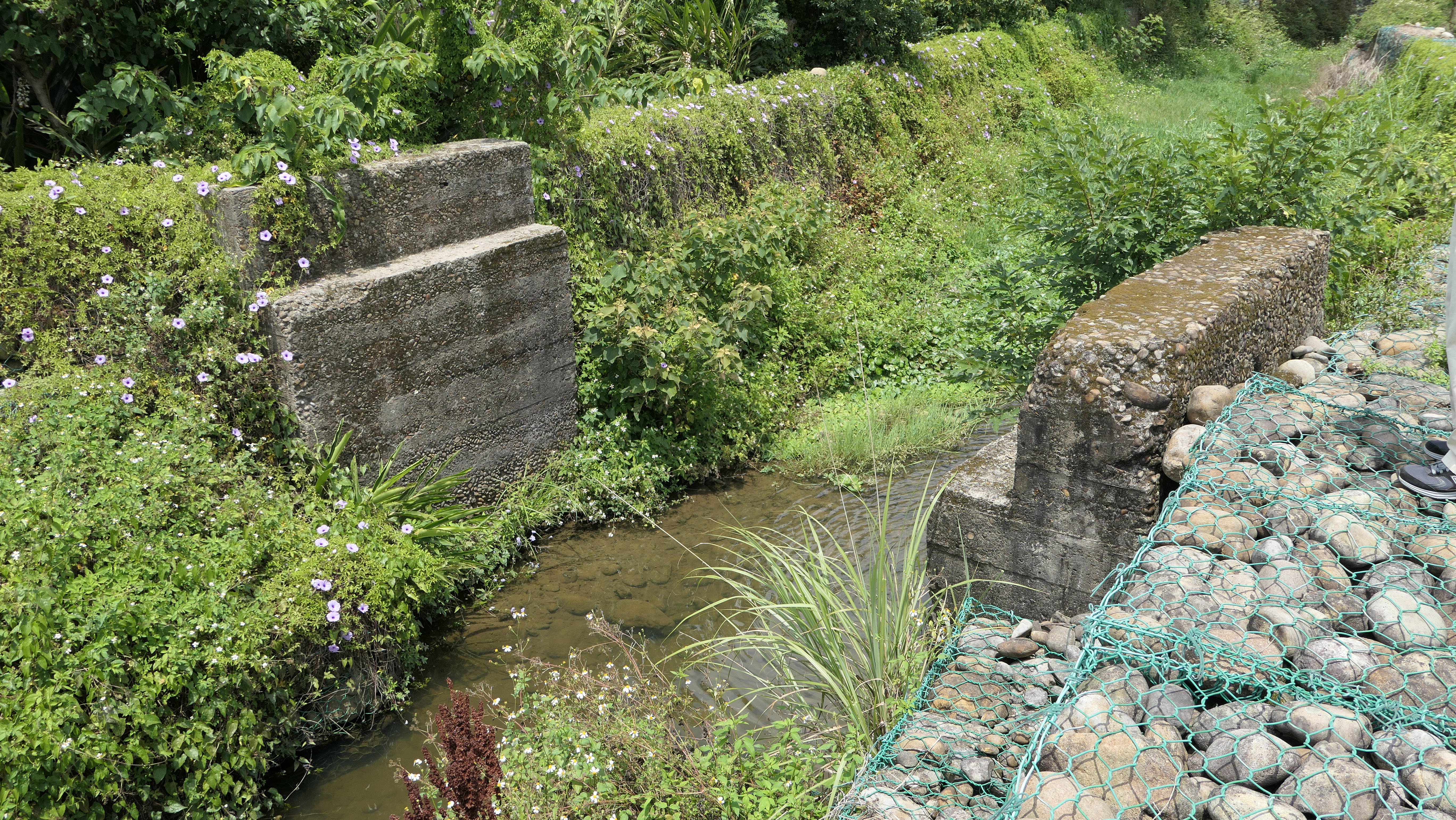 中文（台灣）: 崁仔腳製糖所糖業鐵路少數保存下來的遺址，推測可能是這段路線較早拆除再加上結構不影響河道而矗立至今。